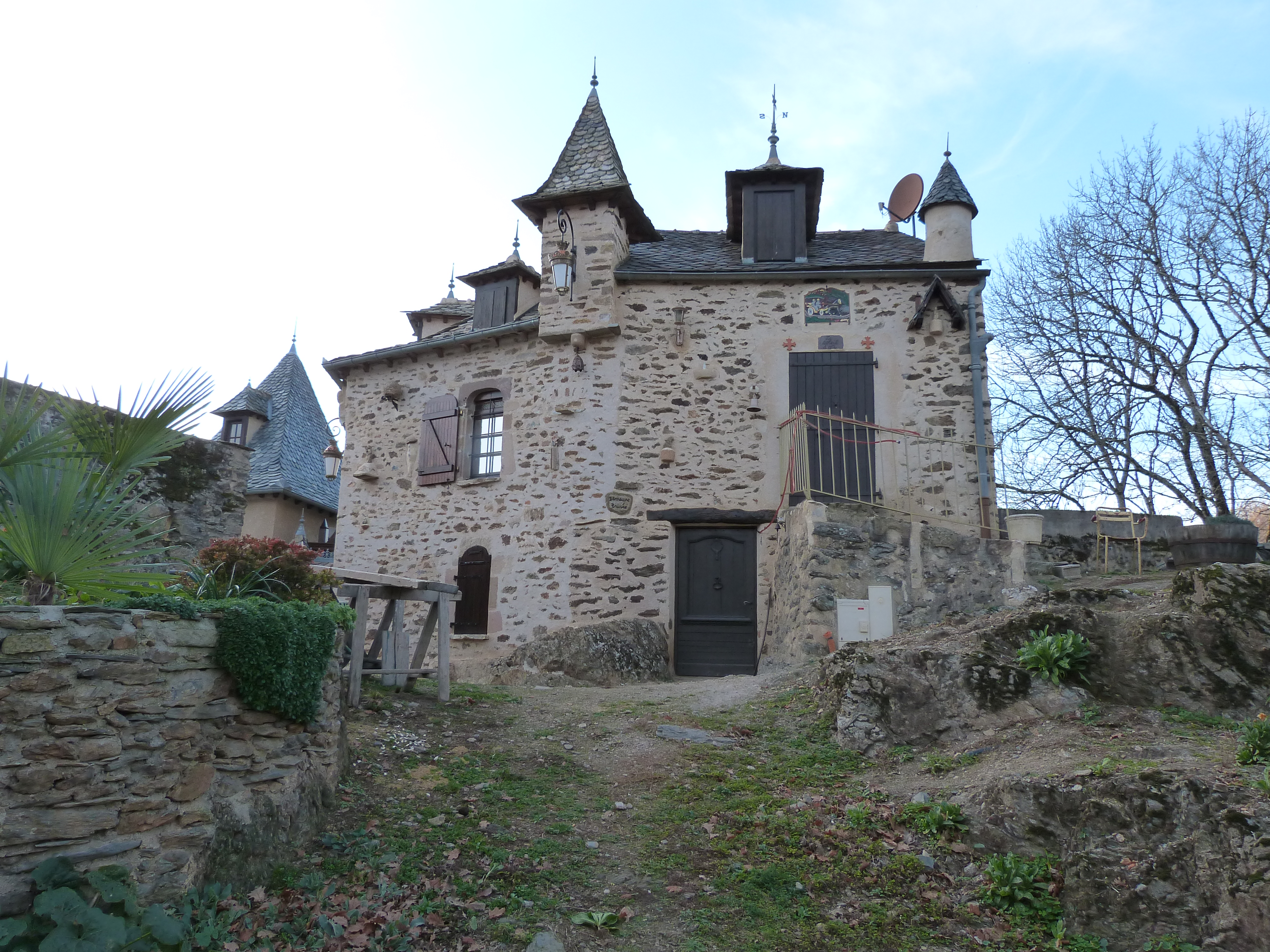 Maison dans le petit village de Castelmary